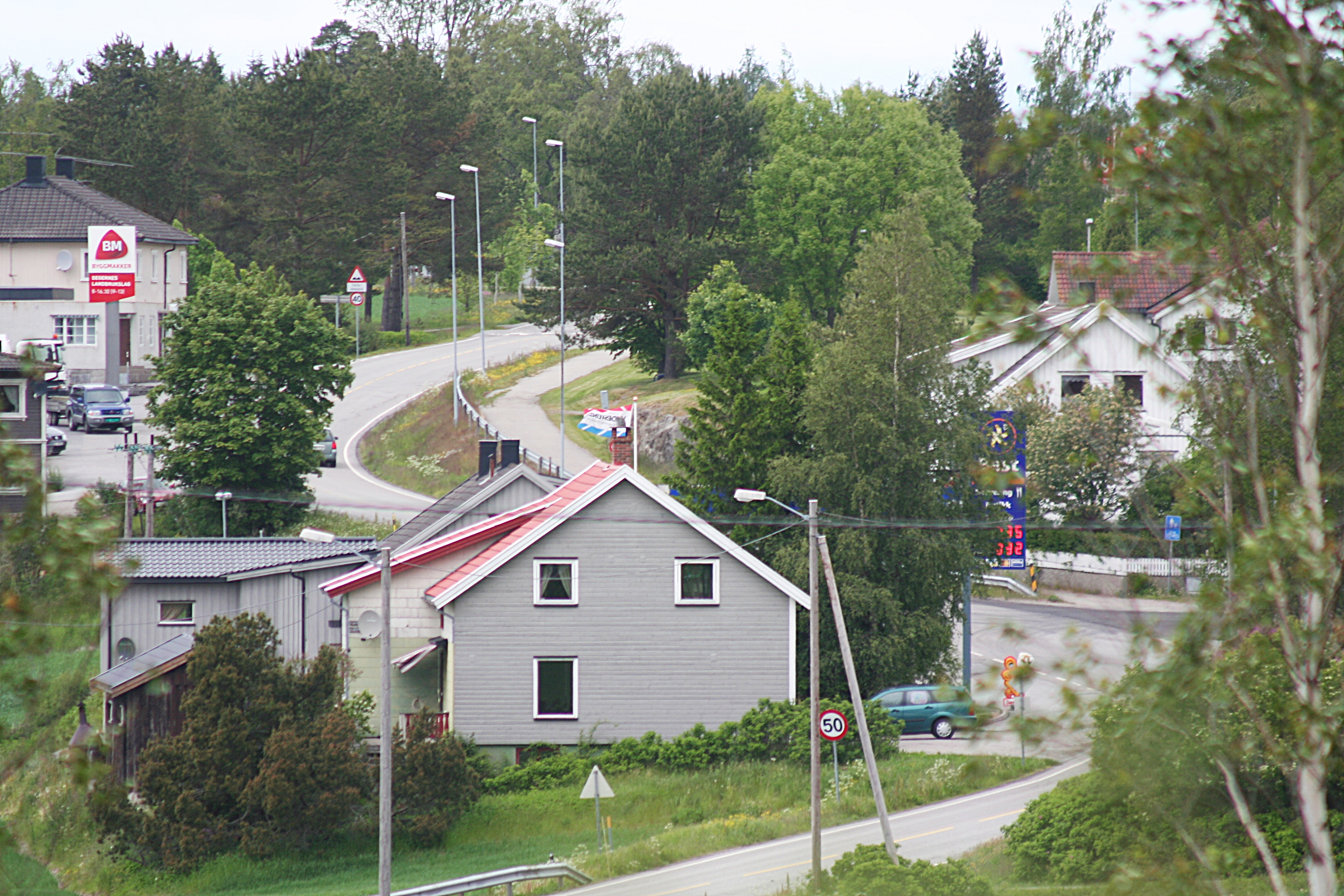 Degernes